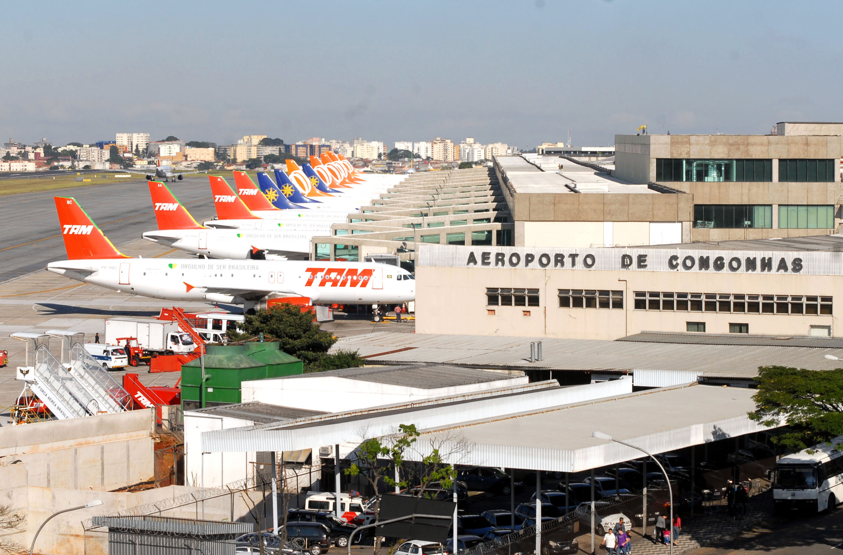 São Paulo - Aviões comerciais pousados em Congonhas, dois dias após o acidente com o vôo 3054. Condições de segurança do aeroporto estão sendo questionadas.